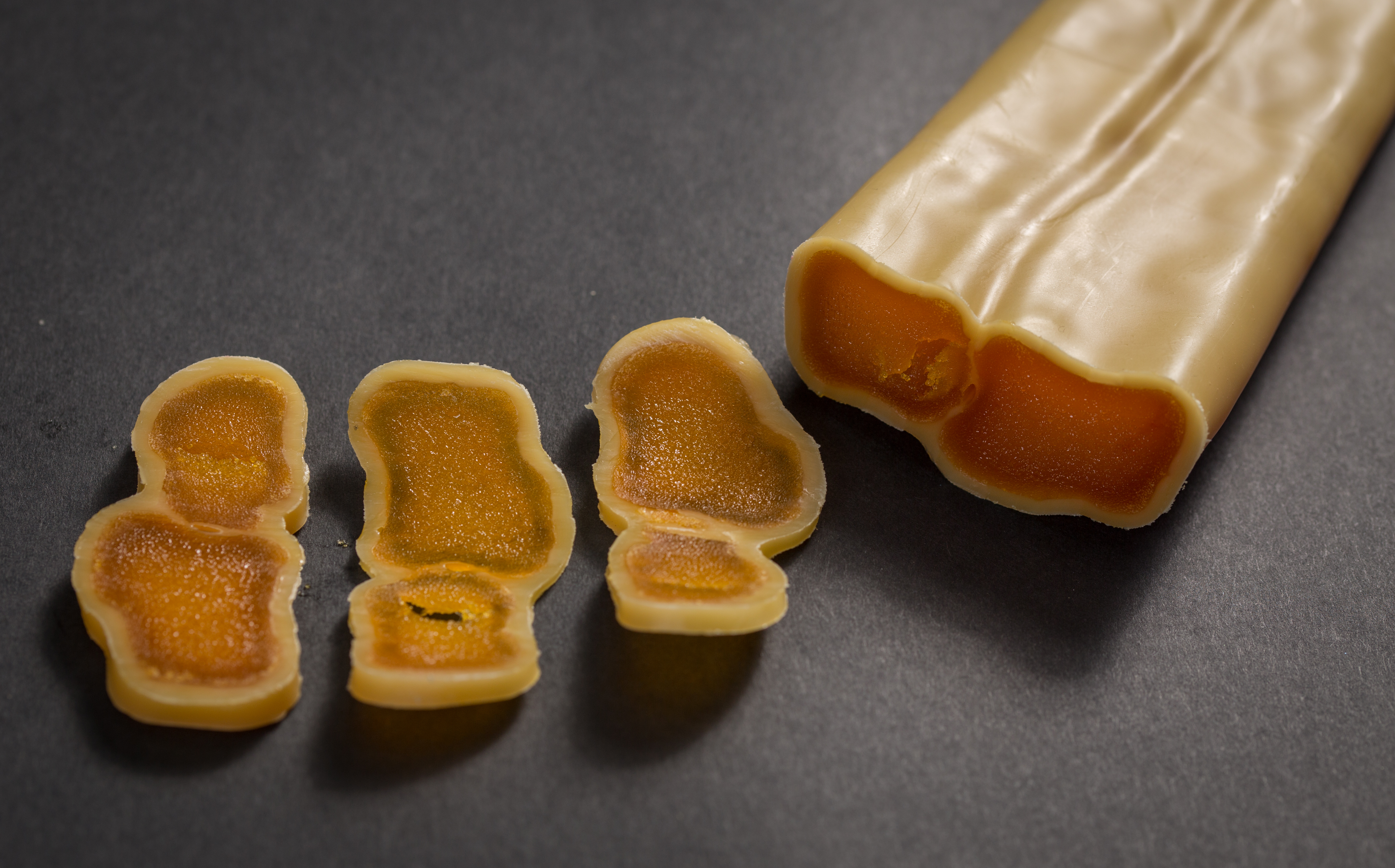 αυγοτάραχο